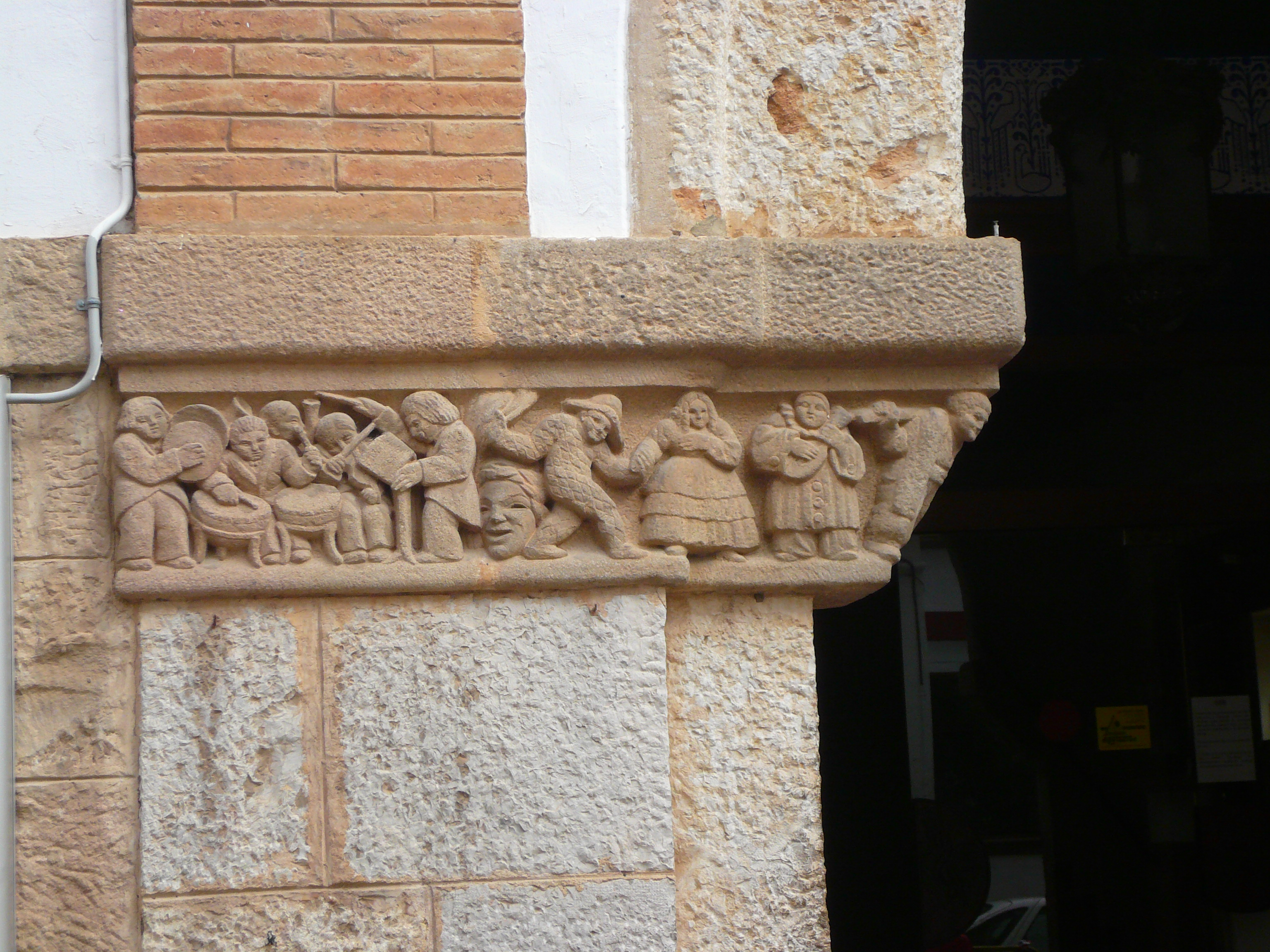 Casino Prado (Sitges) Object location41° 14′ 16.65″ N, 1° 48′ 37.92″ E